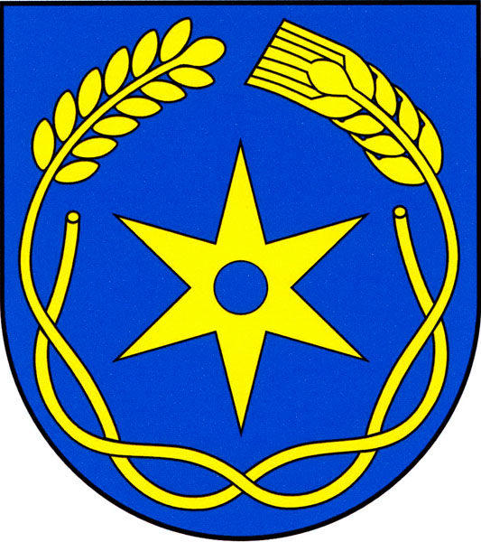 Znak obce Zichovec